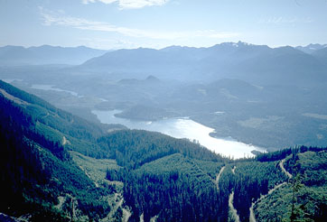 Baker River in WA